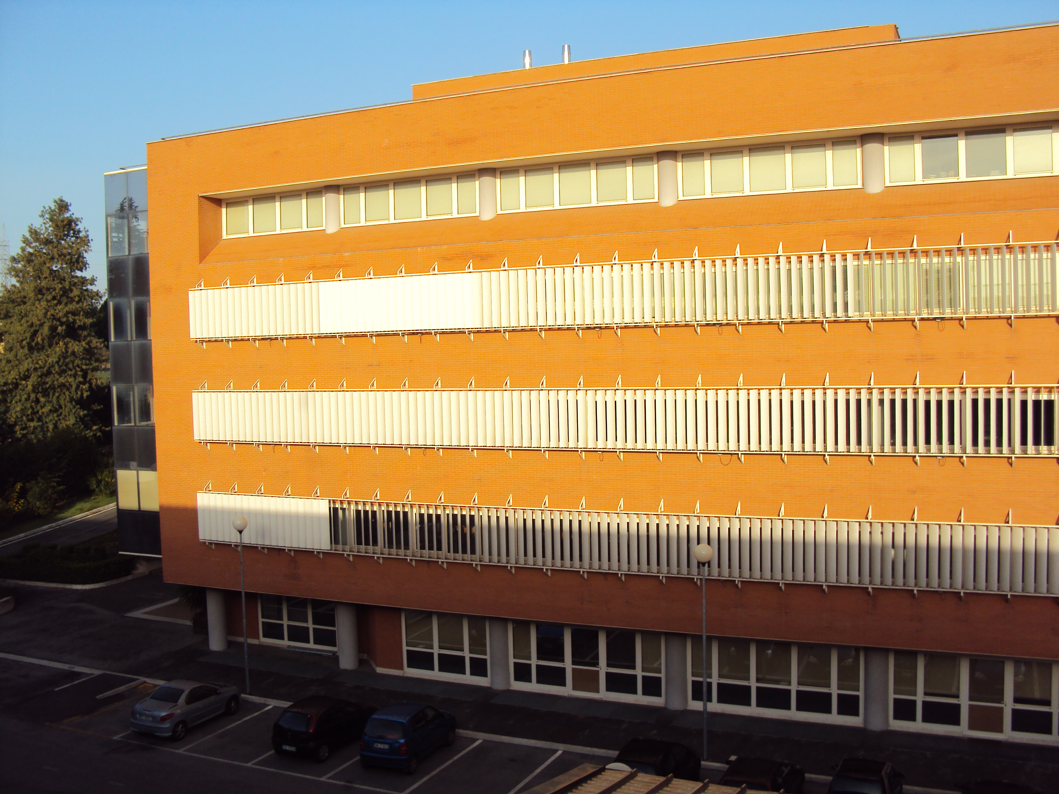 Biblioteca UPS